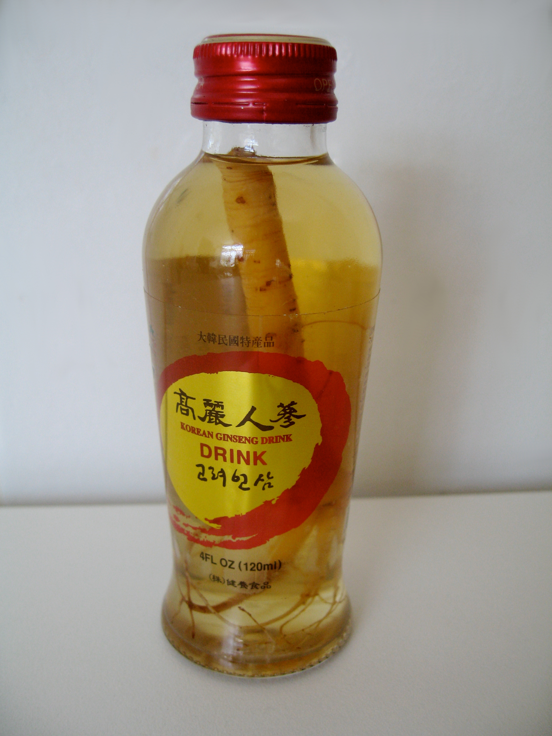 Outra maravilha coreana, essa bebida de ginseng vem com um pedaço de raiz dentro. Ainda não provei, mas imagino ser um tipo de energético.